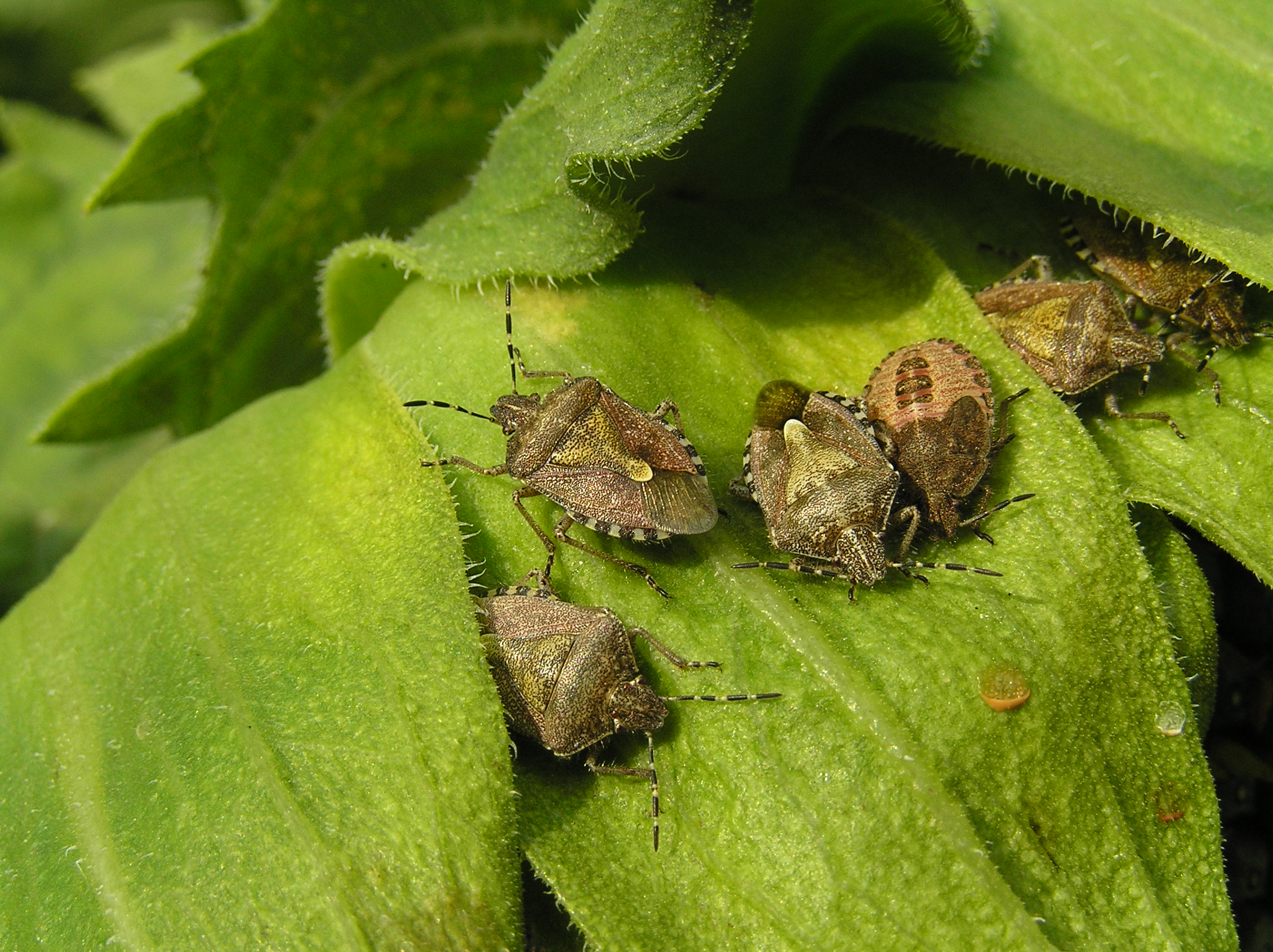 Marjalutikas (Dolycoris baccarum)